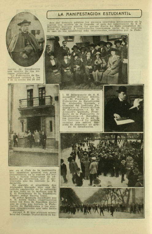 Pagina de la Revista Zig Zag, describiendo la manifestación contra Monseñor Enrique Sibilia, Nuncio Papal en 1913.